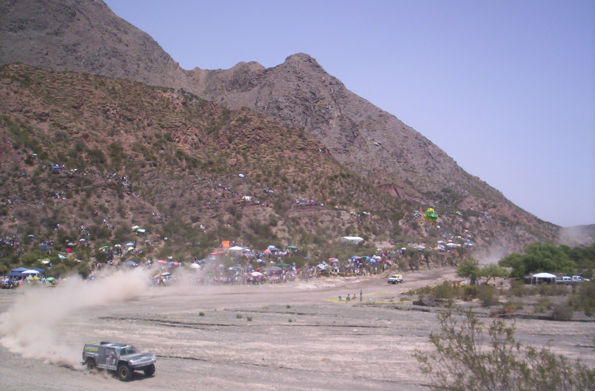 Vista de los autos competidores del Rally Dakar, en su paso por la Provincia de San Juan, Argentina